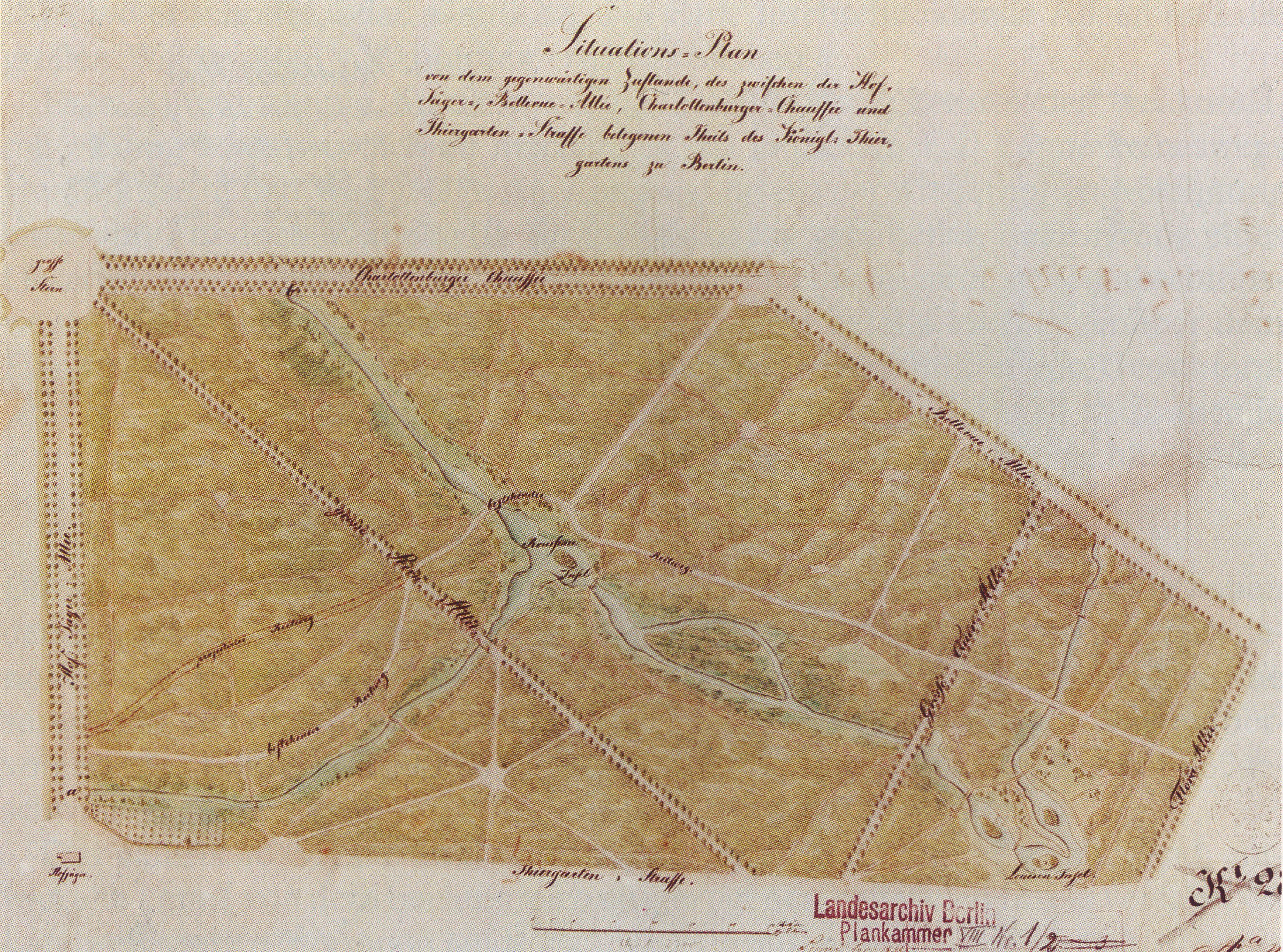 "Situations-Plan vom Gegenwärtigen Zustande des zwischen der Hofjaeger-, Bellevue-Allee, Charlottenburger-Chaussee und Thiergarten-Straße belegenen Theil des Königl. Thiergartens bei Berlin" plan by Peter Joseph Lenné of Tiergarten park in Berlin in preparation of redesign, drawn by Gerhard Koeber, quill, pencil and watercolor, 49,7x36,5cm, Landesarchiv Berlin